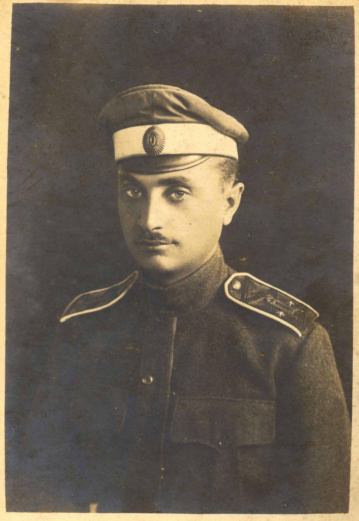 генерал-майор Харжевский Владимир Григорьевич (1892-1981), последний командир Дроздовской дивизии